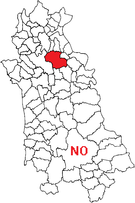 Mappa con posizione del comune nella provincia italiana di Novara